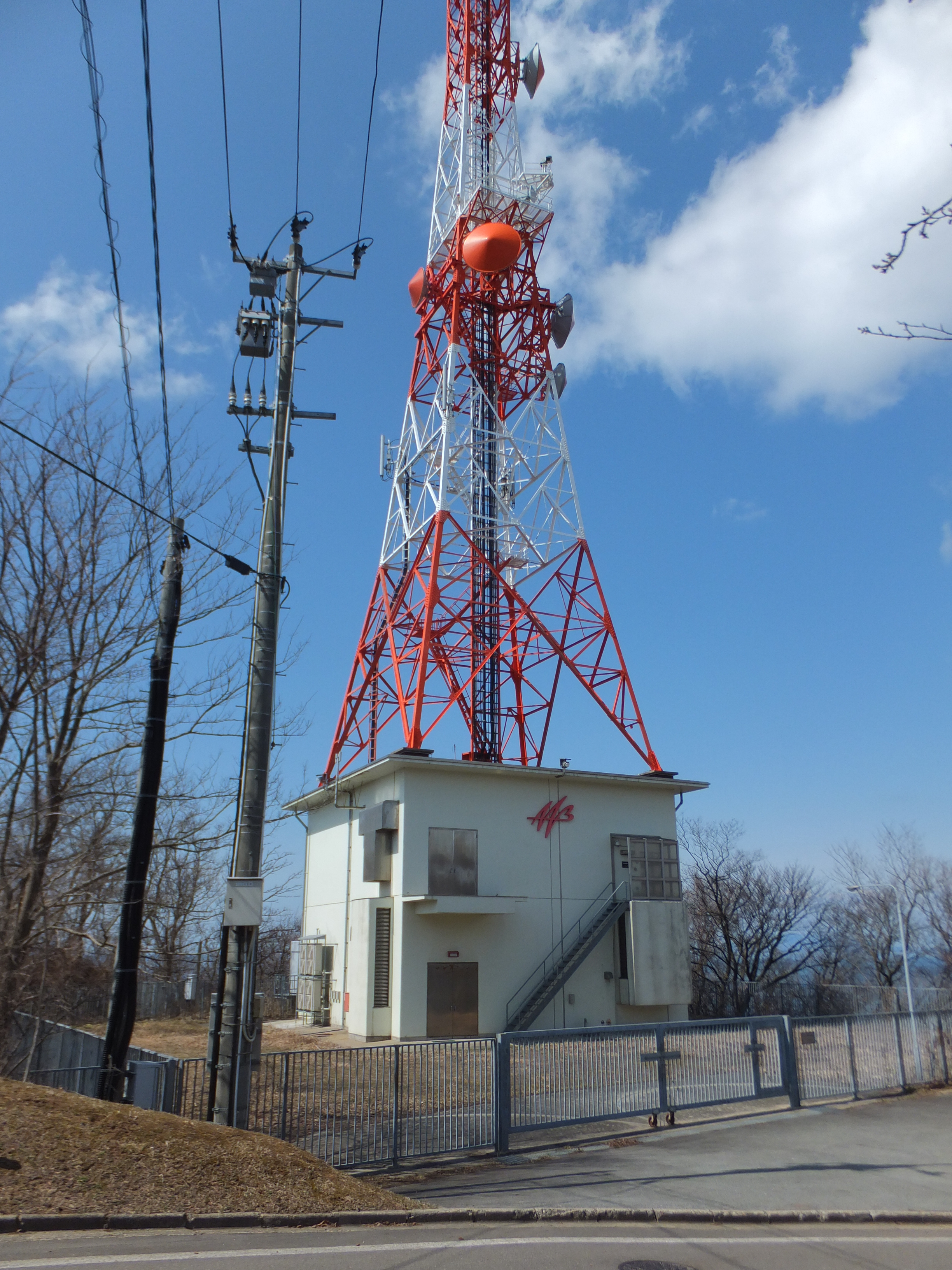 秋田朝日放送大森山送信所